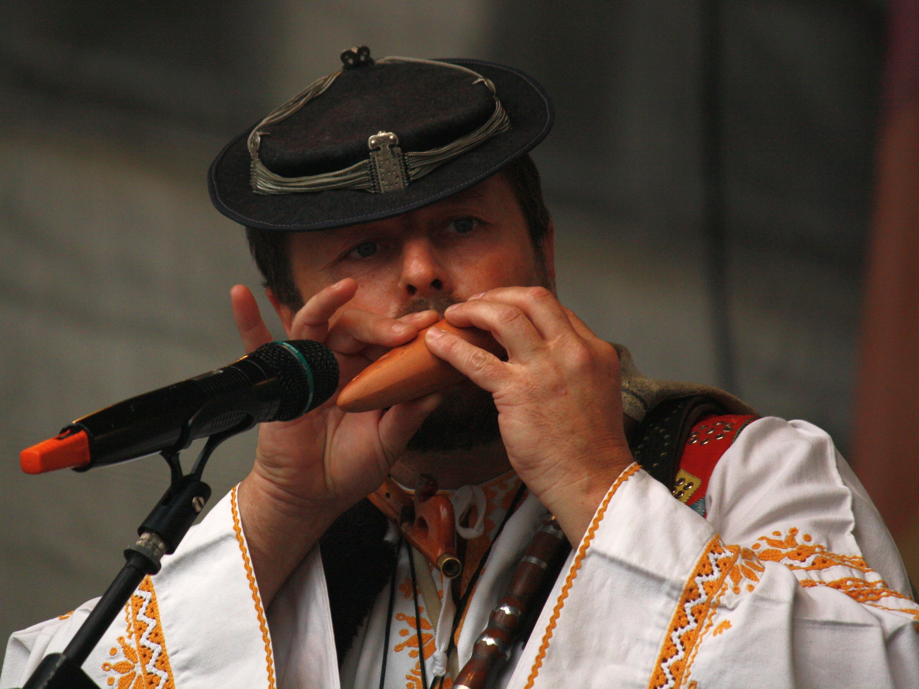 7. mezinárodní folklórní festival Pražský jarmark - slovenský výrobce a hráč na lidové nástroje This photograph was taken with a DSLR from WMCZ's Camera grant.